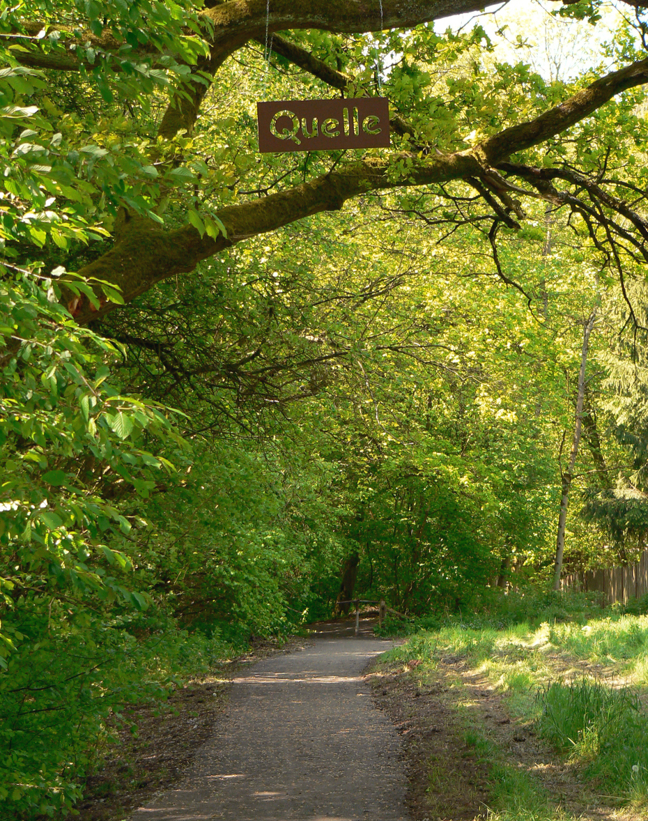 Naturdenkmal Schunter-Quelle und Schunter-Radweg